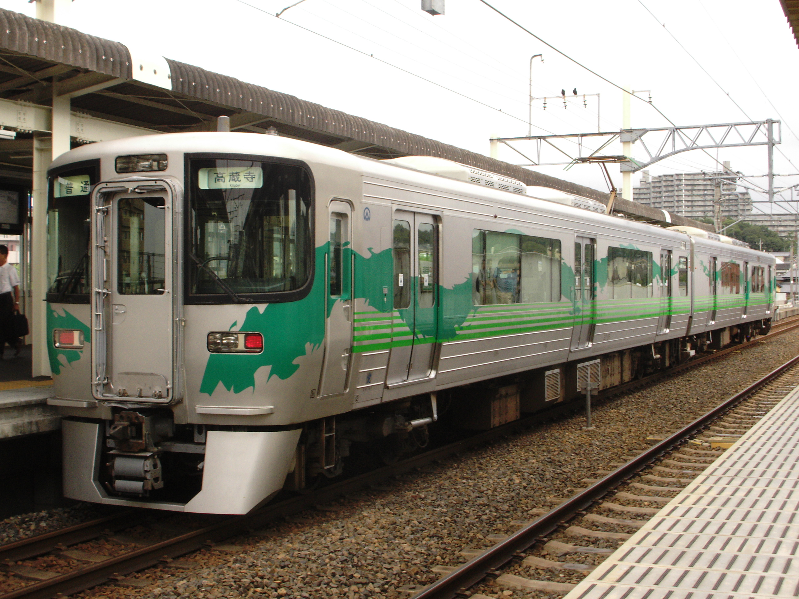 愛知環状鉄道2100系(新豊田駅にて)